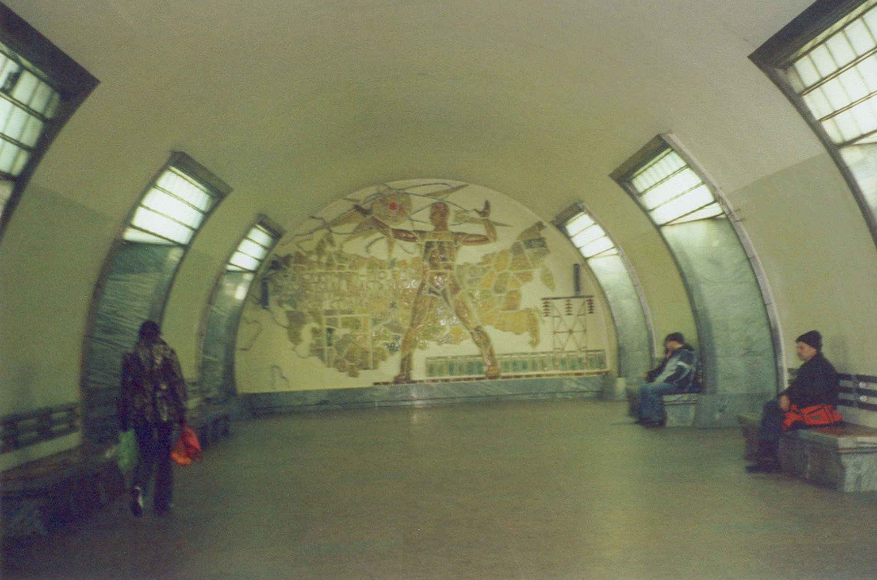 Станция метро «Электросила»